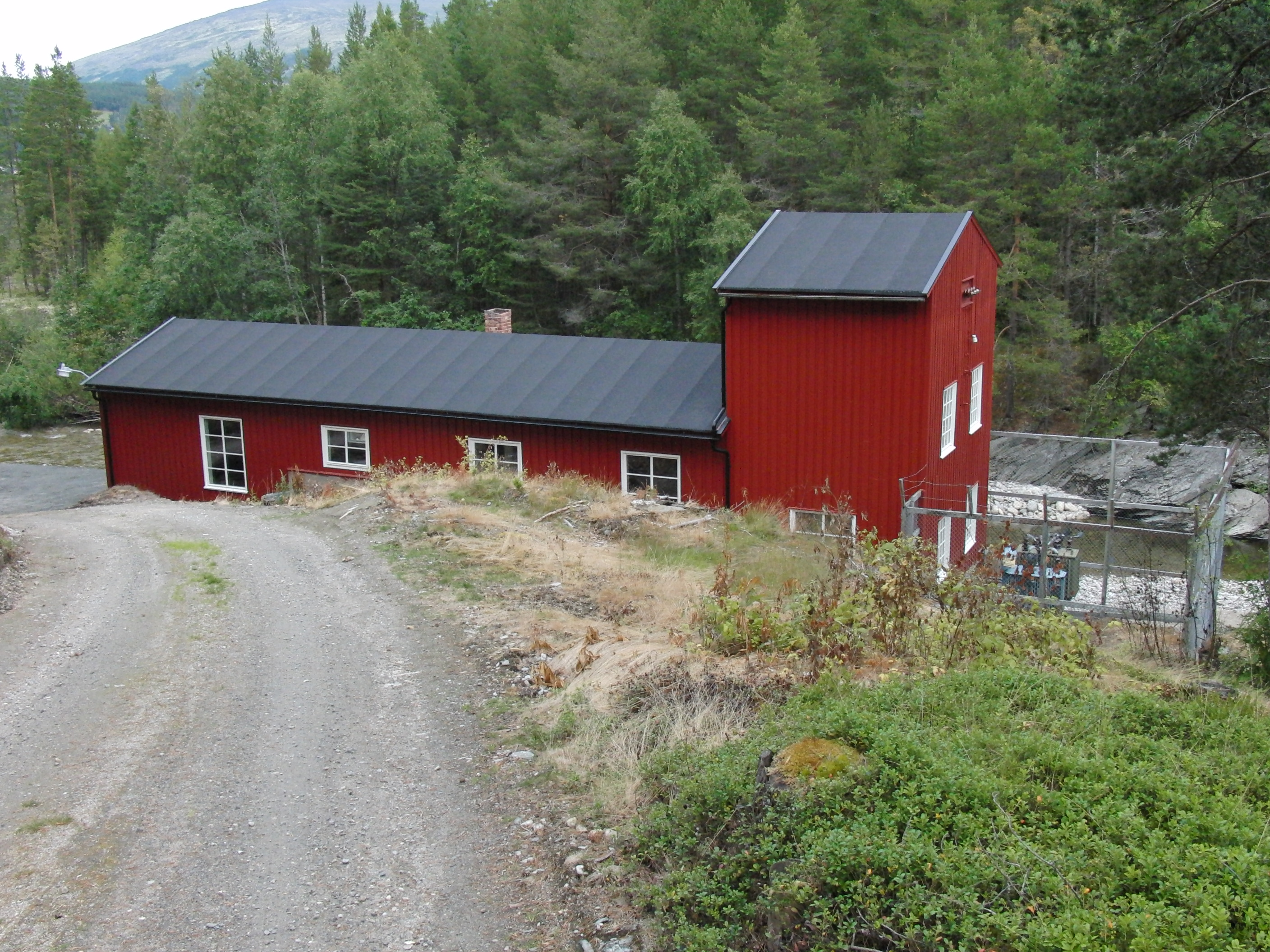 Sølna kraftverk